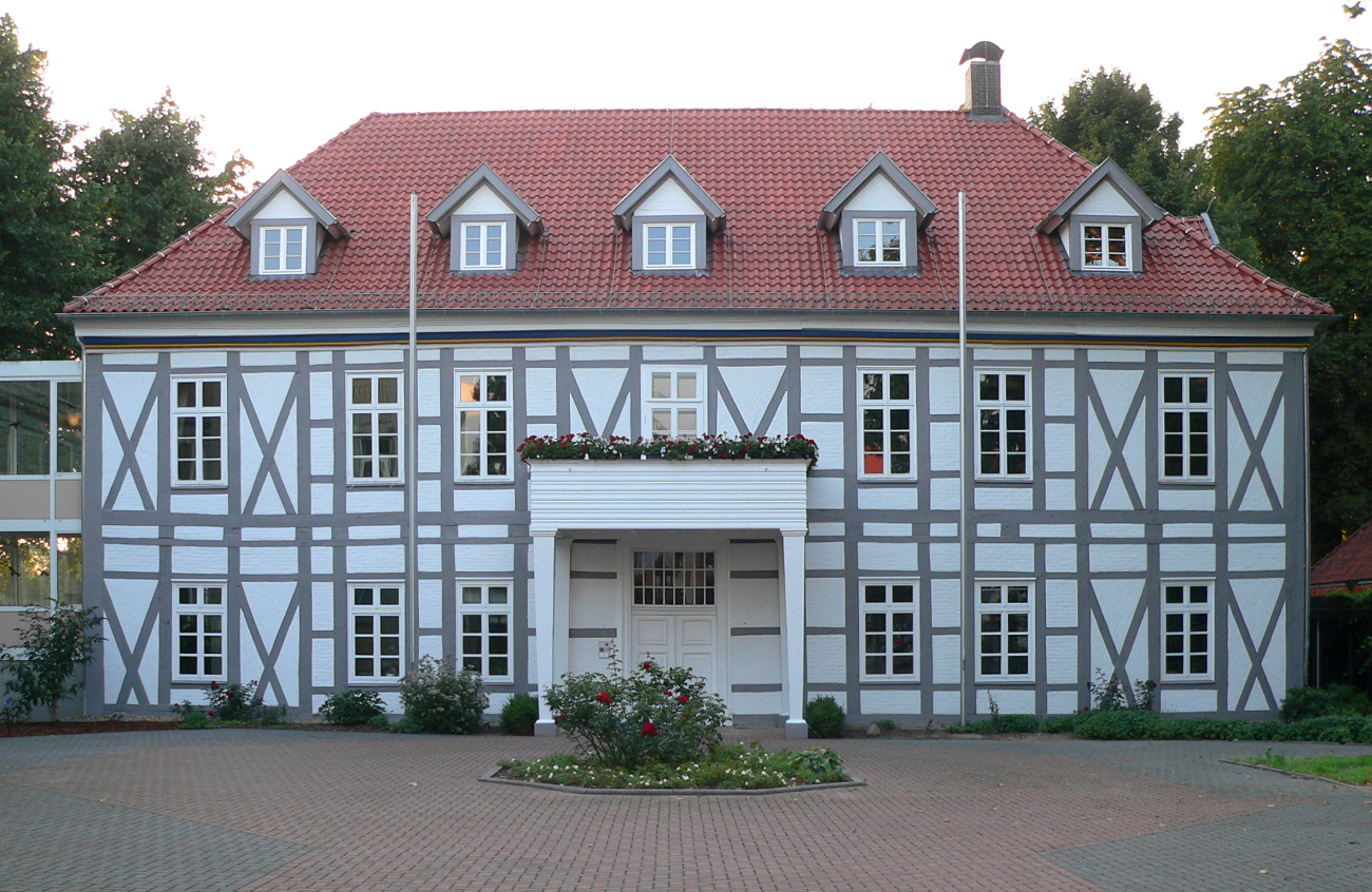 Amtshaus in Nienburg/Weser, erbaut Mitte des 18. Jahrhundert als Sitz des Amtes